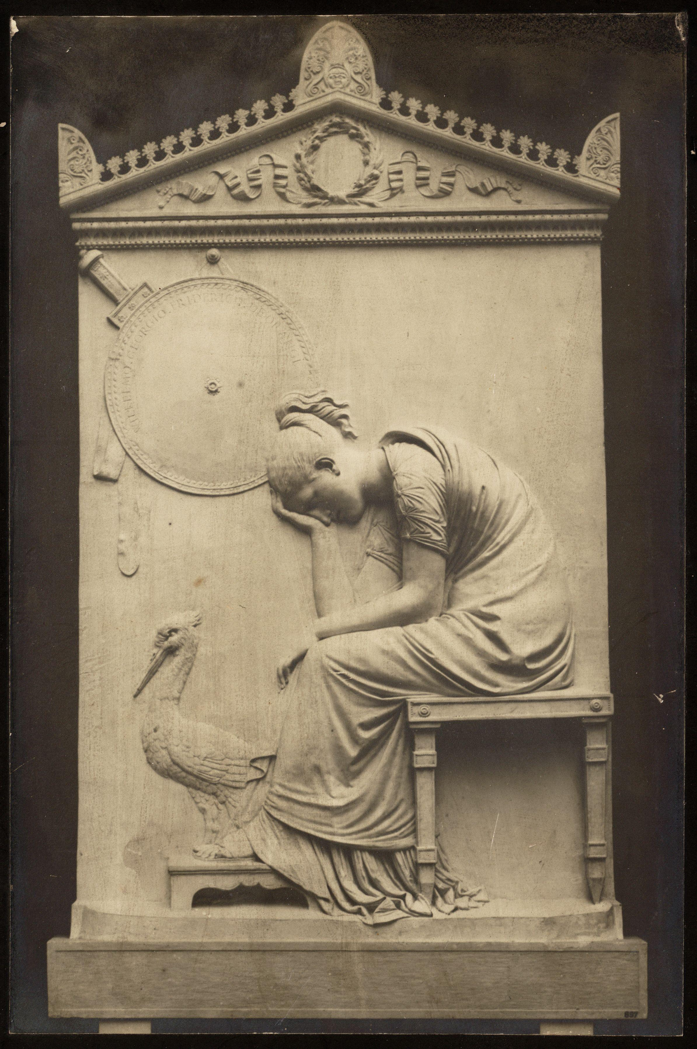 Gipsafgietsel (?) van het grafmonument van Canova ter nagedachtenis aan Willem George Frederik van Oranje-Nassau in Delft. Foto. Afmetingen onbekend. Amsterdam, Stadsarchief Amsterdam, Fotoarchief B.W. Stomps.